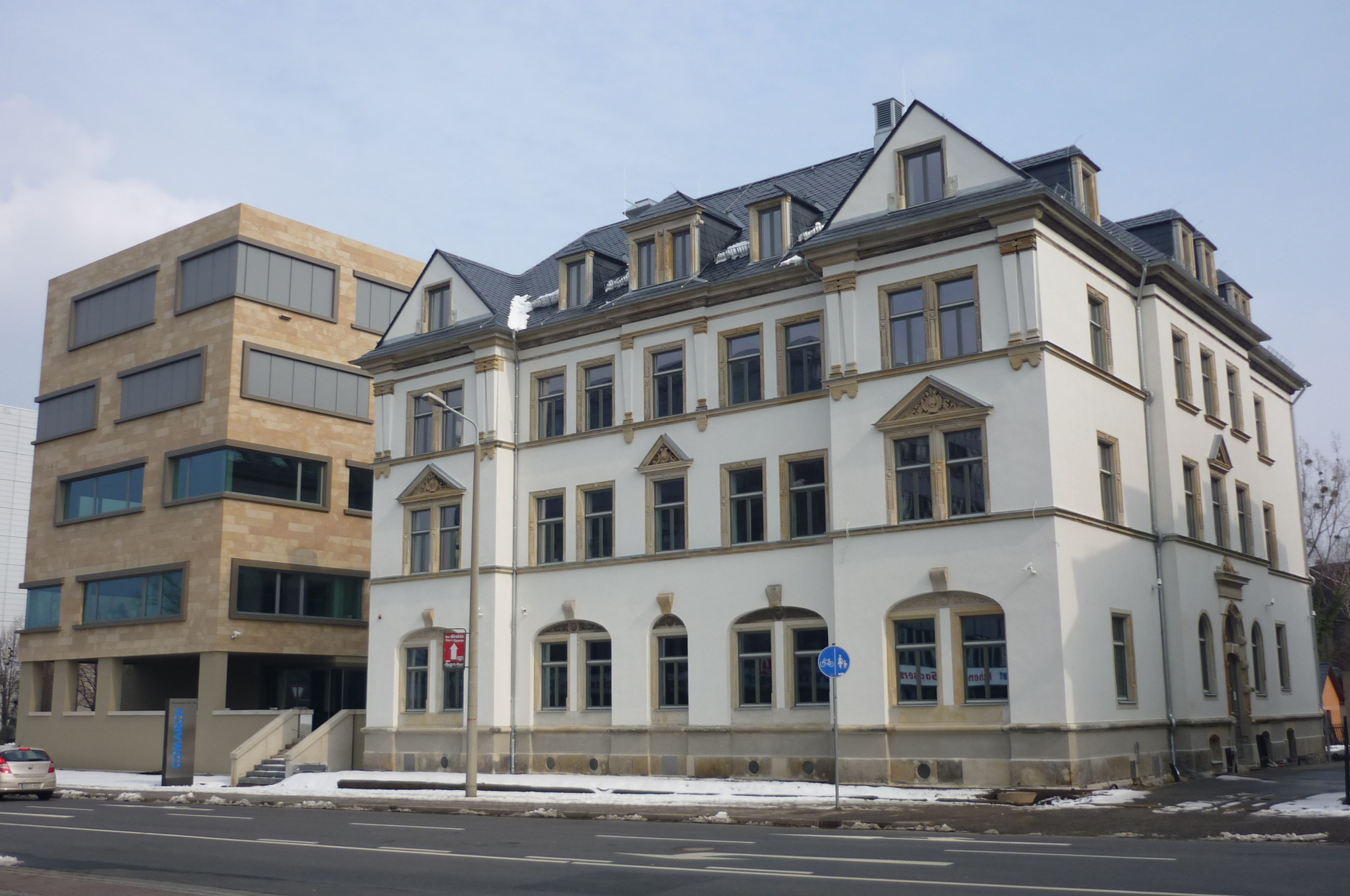 Bürohaus in Dresden-Südvorstadt, Chemnitzer Str. 59b (jetzt Stammsitz von Comarch Deutschland)